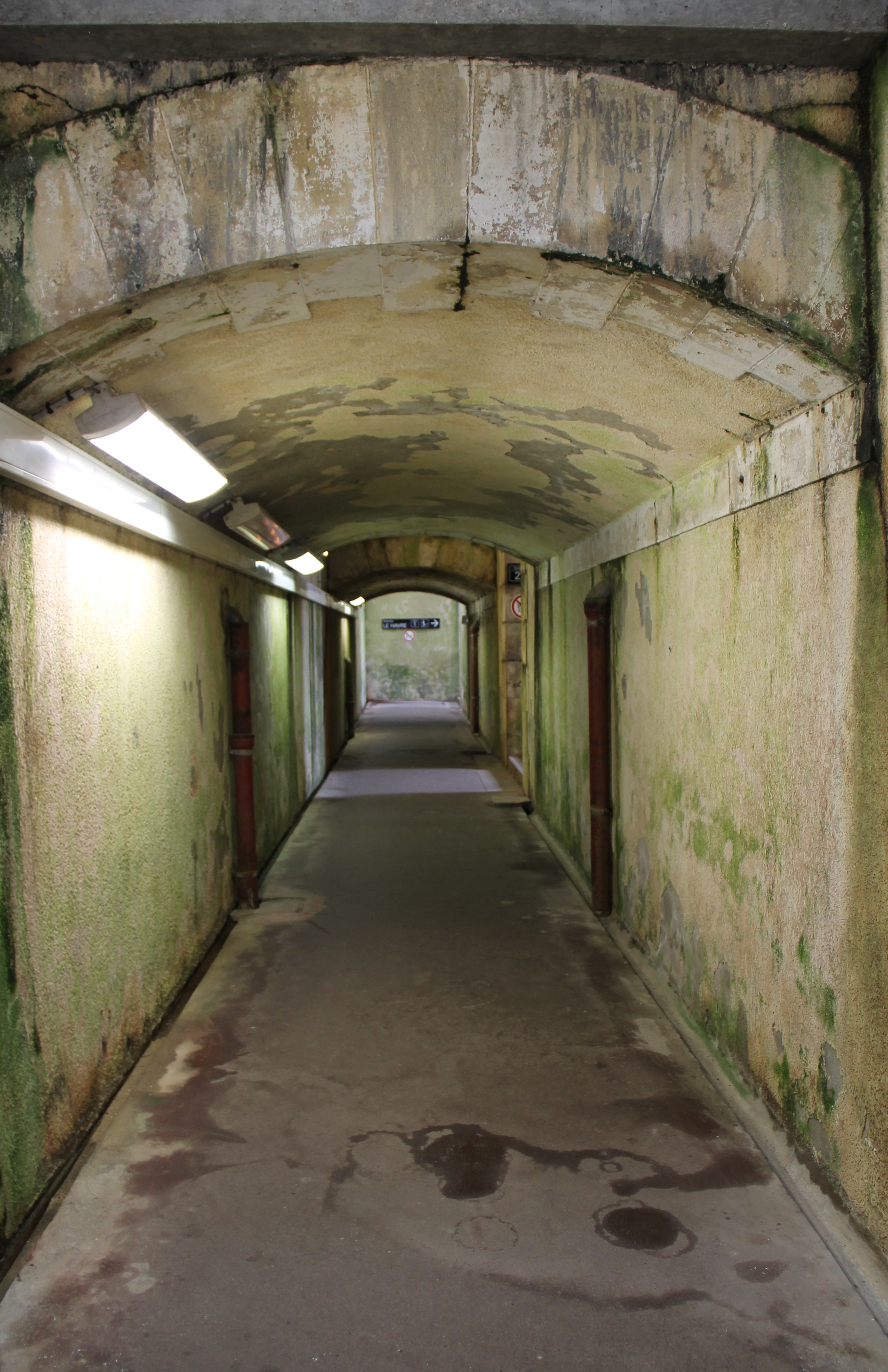 Passage souterrain donnant accès aux quais, en gare de Motteville, Seine-Maritime, France.